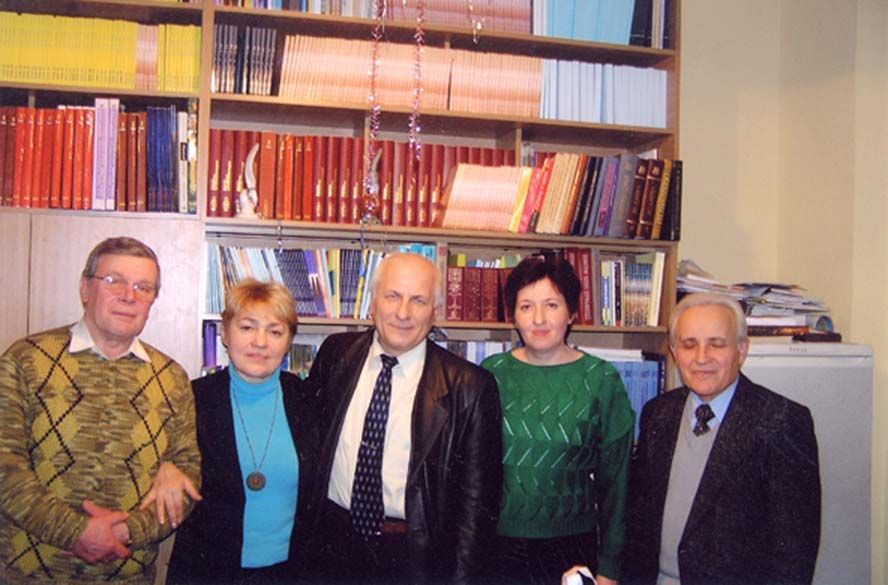 Фото